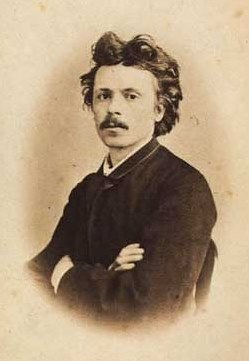 Ludvig Abelin Schou (L.A. Schou) (1838-1867), Danish painter